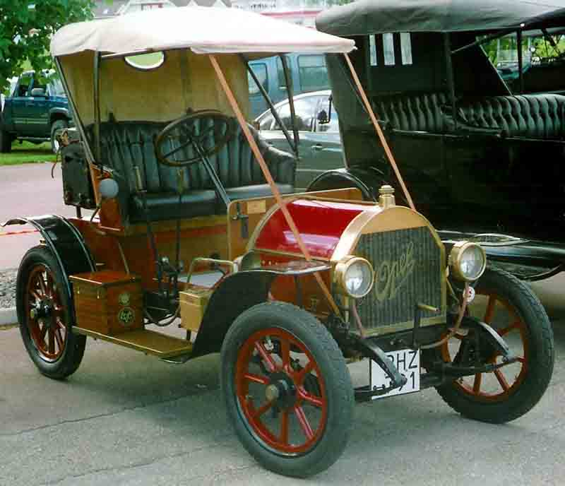 Opel 4/8 PS Doktorwagen 2-Sitzer 1910